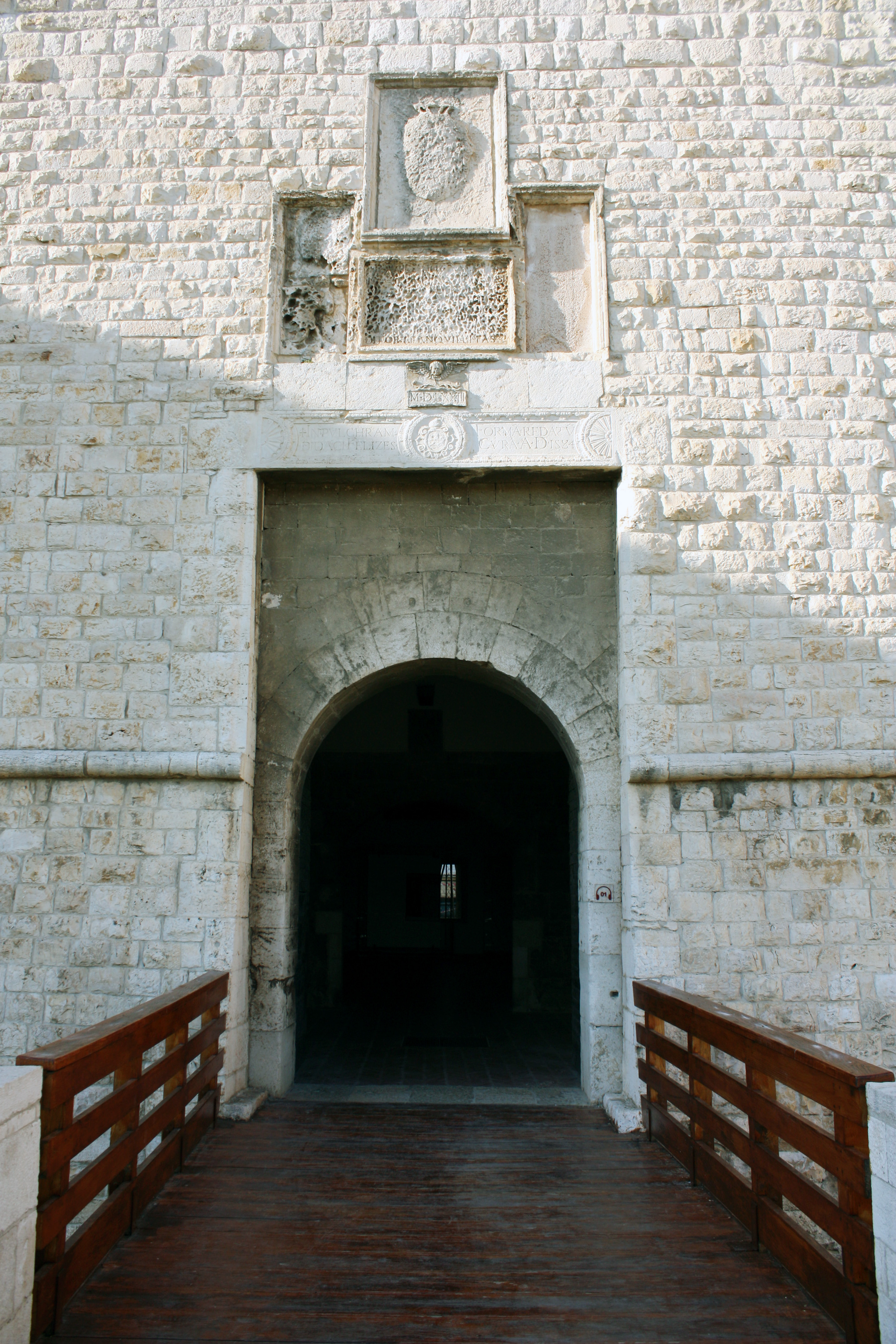 Castello di Barletta - Il portale d'ingresso al castello